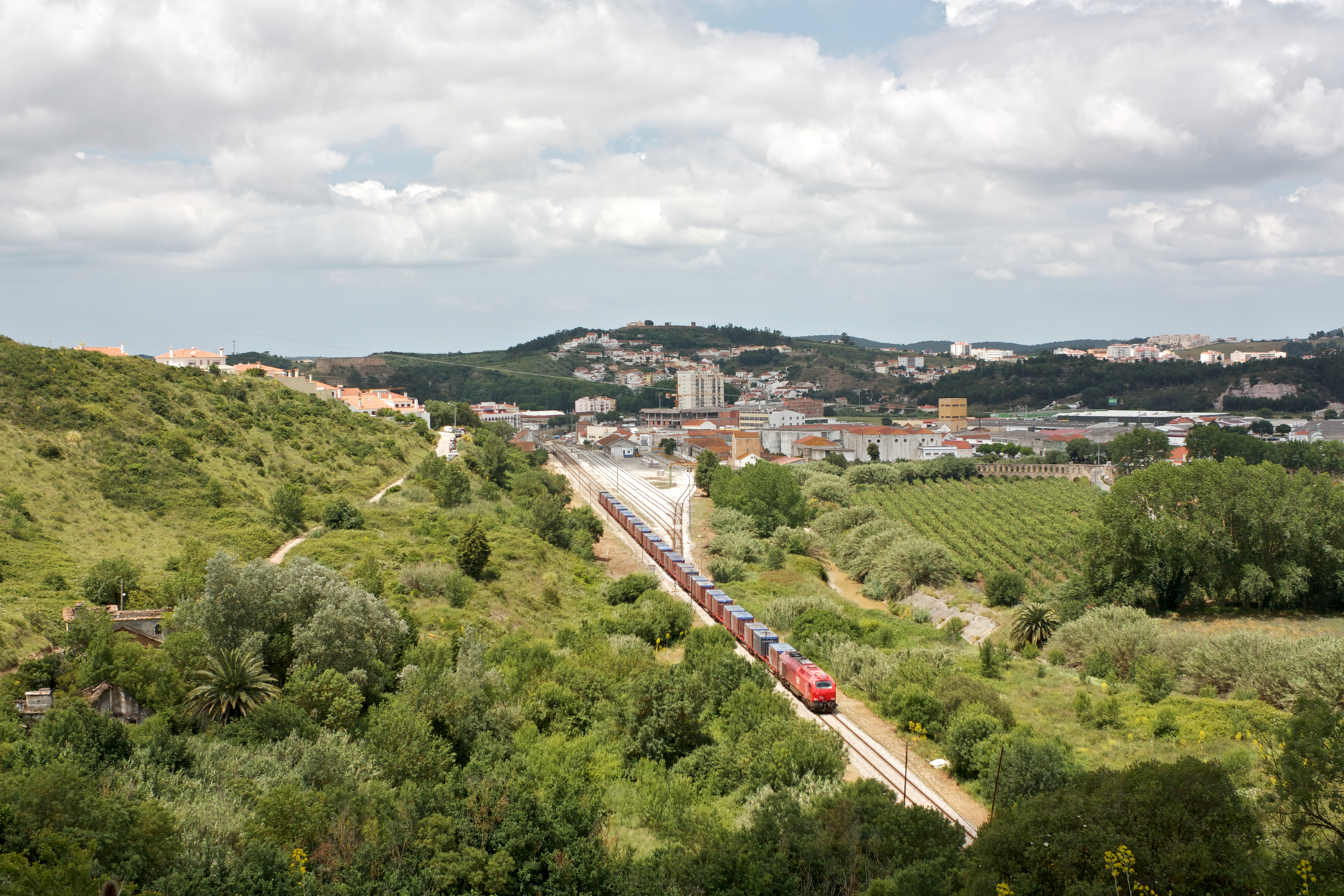 Tipo: Comboio de Transporte de Clínquer 56682 [Pataias - Praias do Sado] Local: Torres Vedras [Linha do Oeste, PK 63] Data e hora: 19 de Maio de 2011 [13h25] Material: Locomotiva 60xx + 15 vagões TK Sgnss